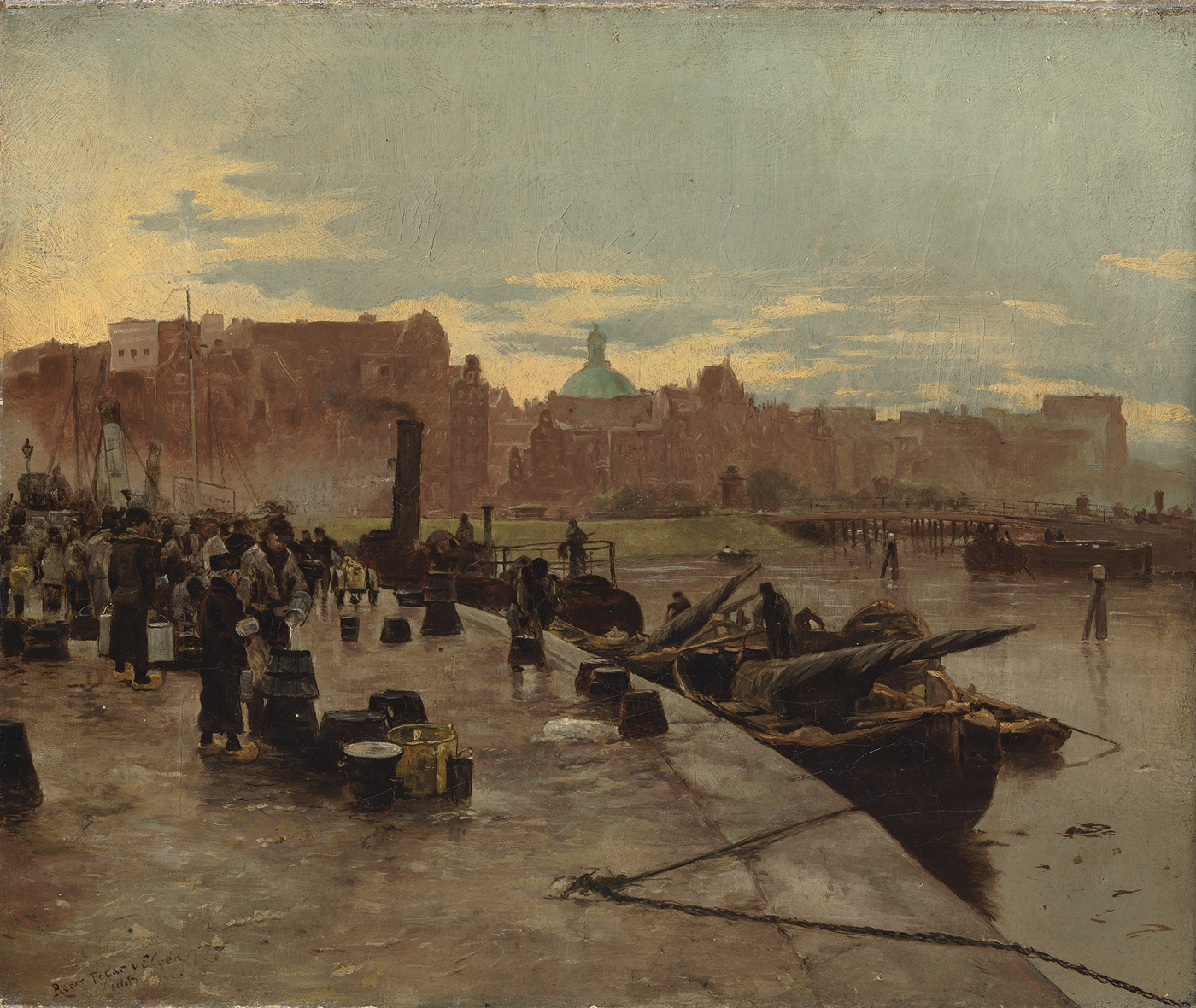 schilderij; stadsgezicht; stadsgezicht Amsterdam; Prins Hendrikkade; melkmarkt; Oude Teertuinen; Ronde Lutherse Kerk